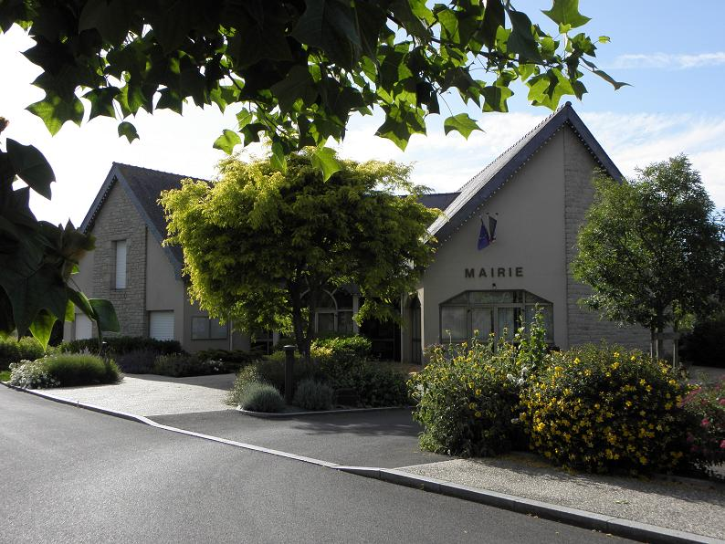 Mairie de La Fresnais (35).